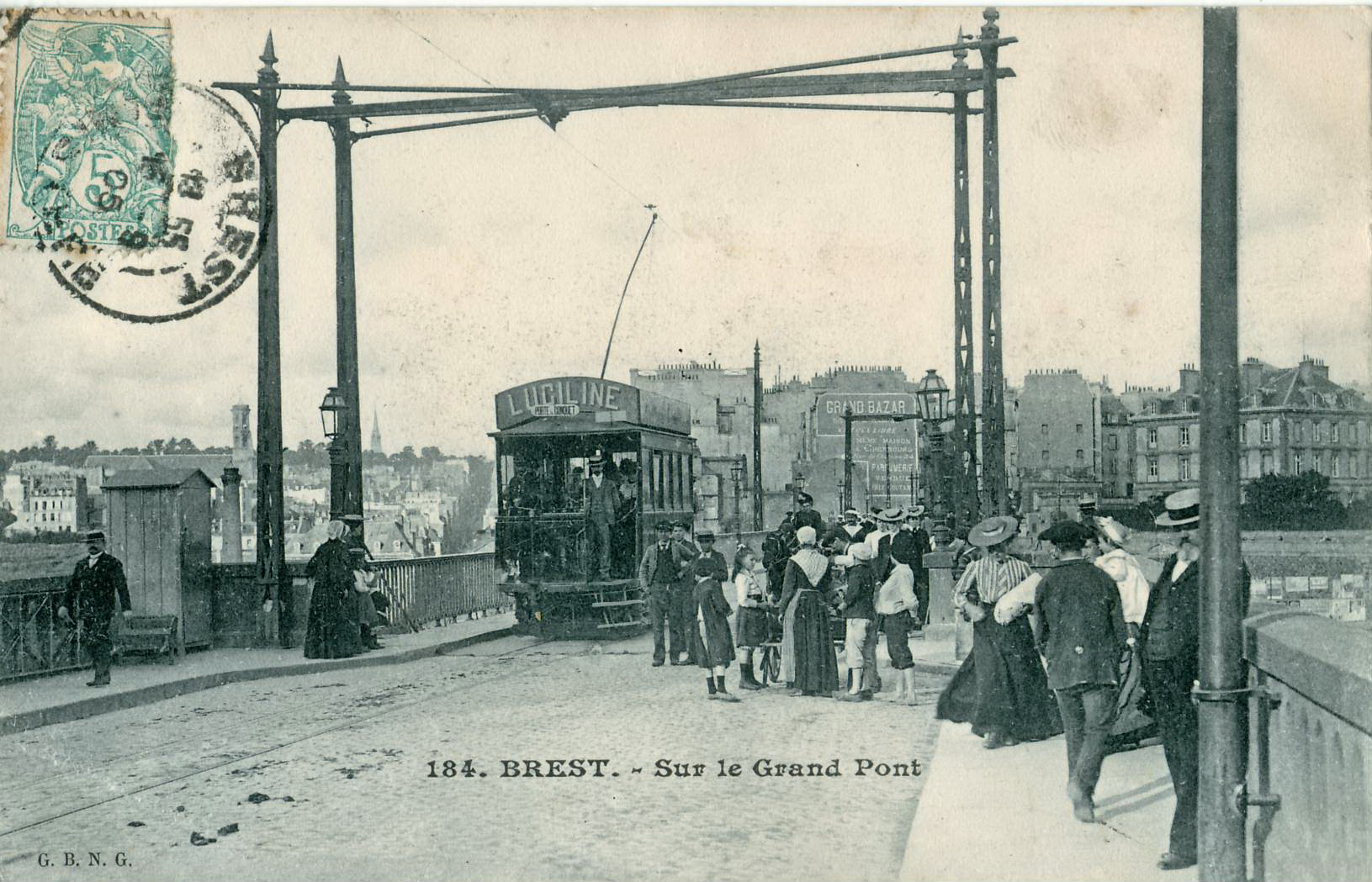 Carte postale ancienne éditée par GBNG, N°184Brest (France) - Sur le Grand PontVue d'une motrice du tramway vers la Porte du Conquet